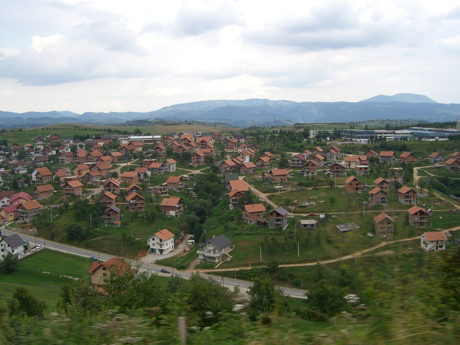 Panorama de Vlasenica